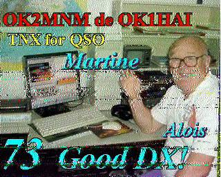 Typický snímek SSTV, který přijal na kmitočtu 3,736 MHz uživatel Bruxy -- radioamatér se značkou OK2MNM.